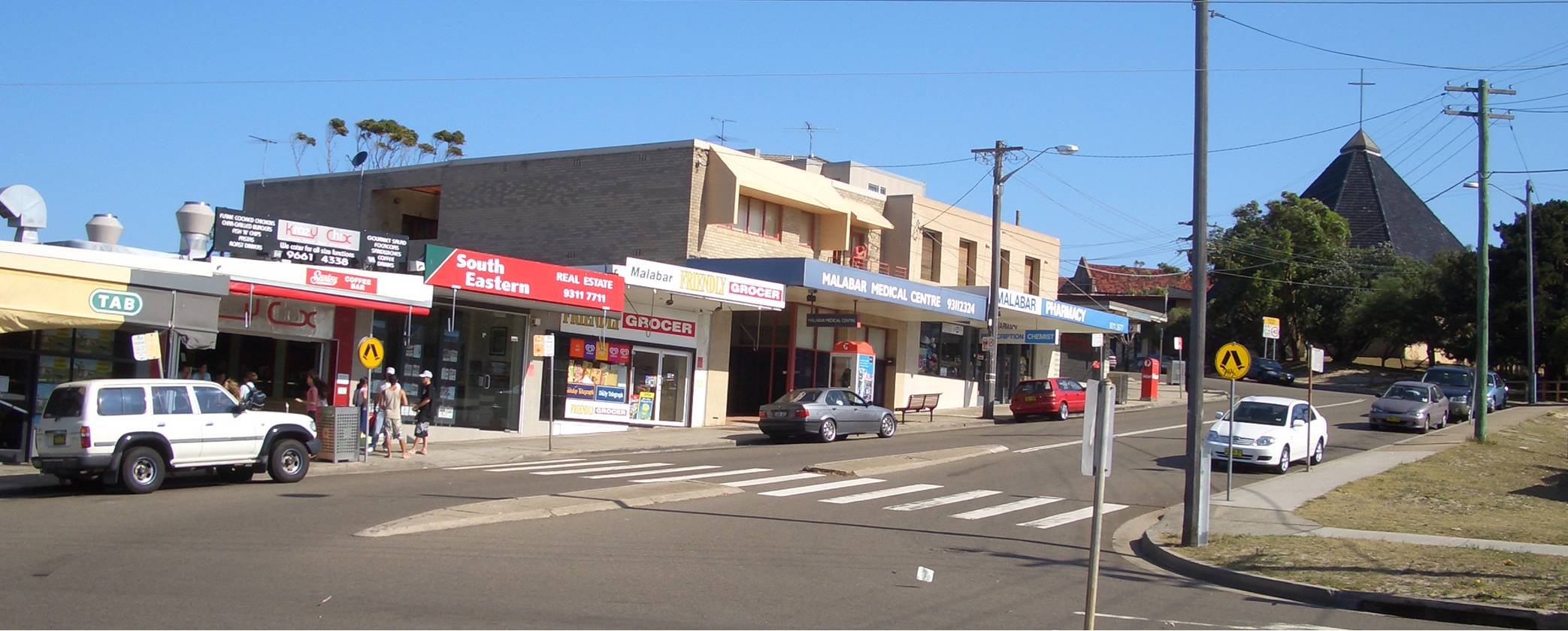 Malabar shops